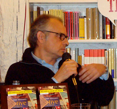 Sabino Méndez en la presentación de 'Tipos Infames', libro de Micah P. Hinson, en Madrid